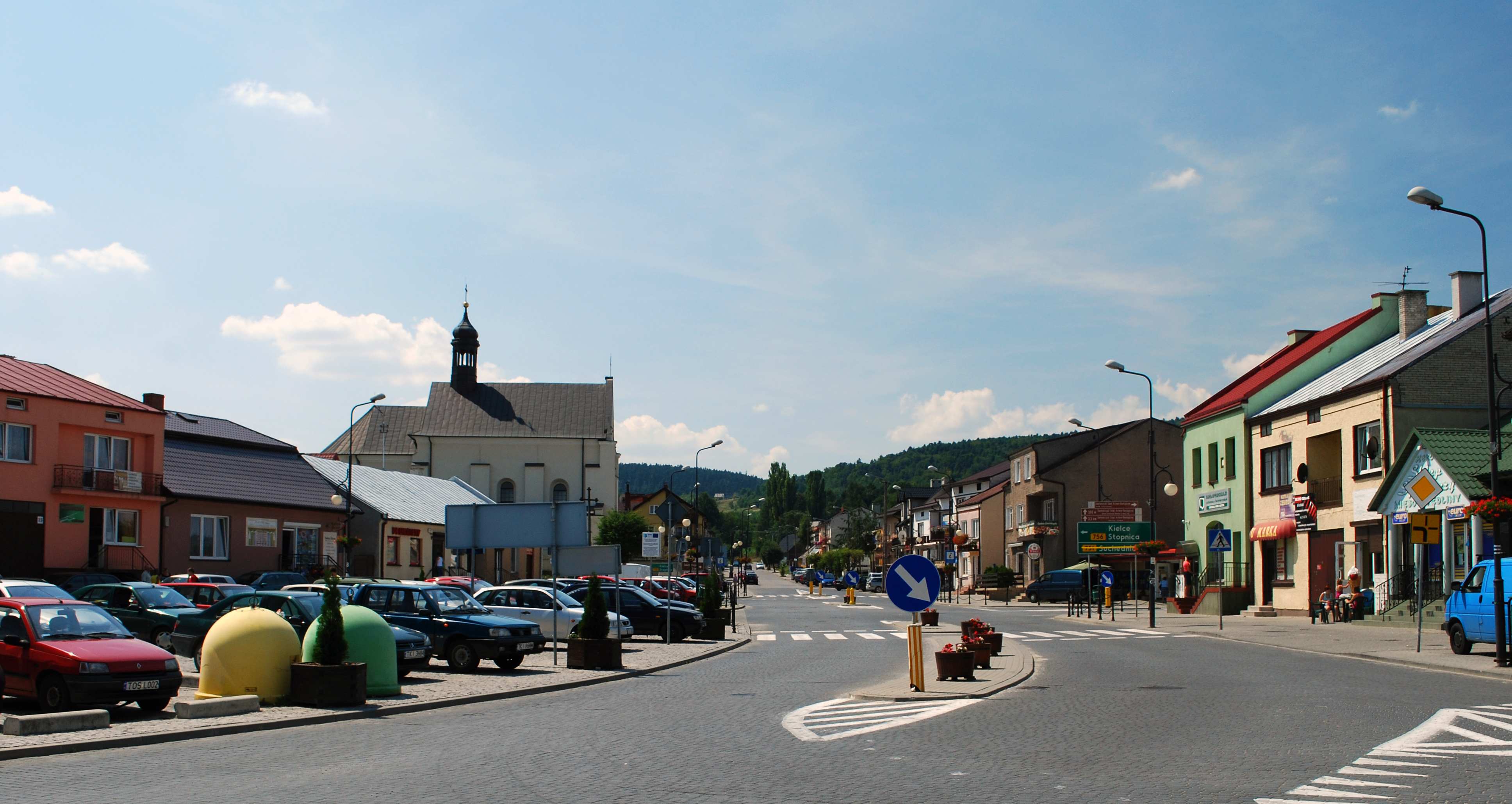 Nowa Słupia: Rynek